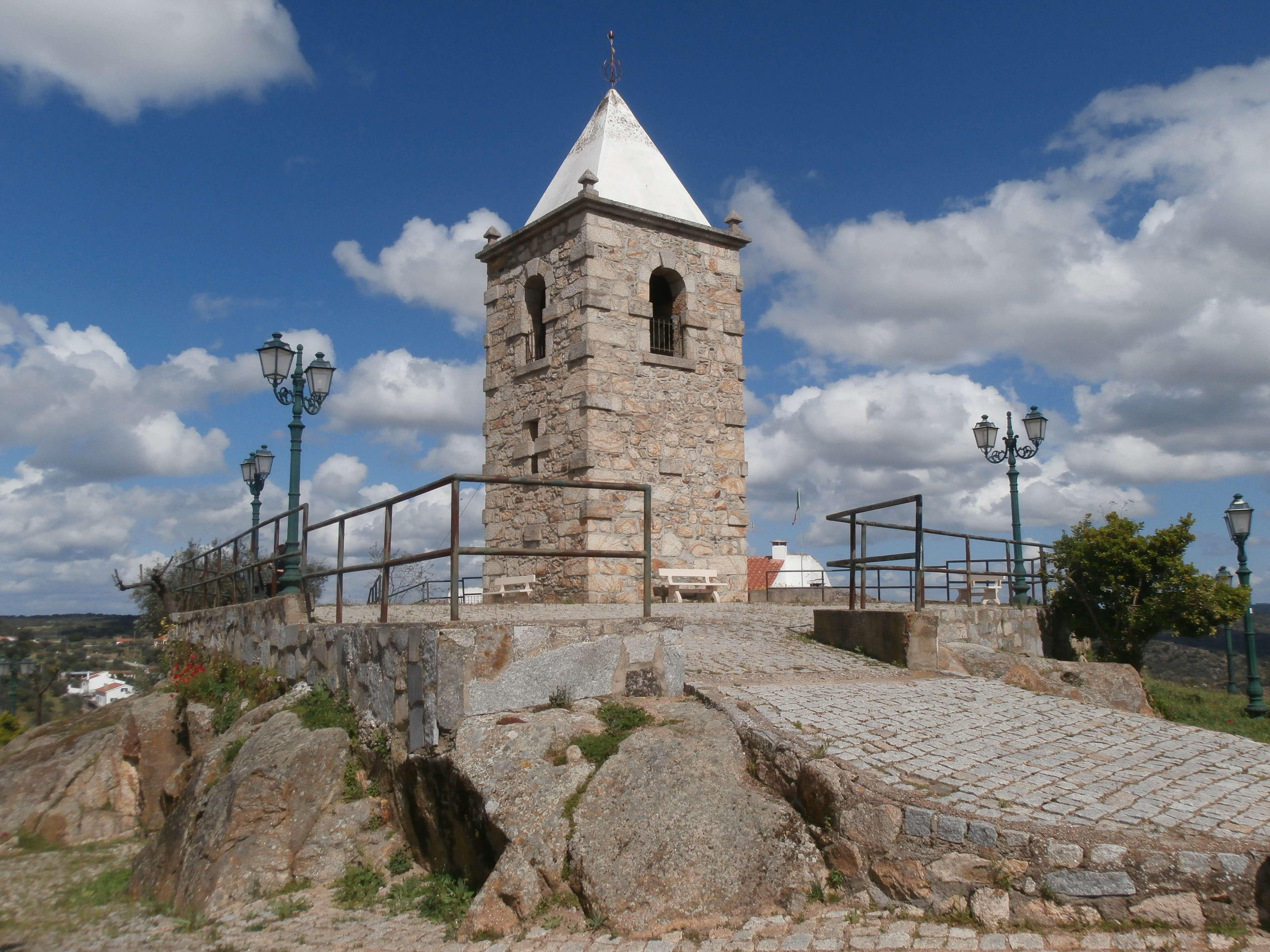 Fortaleza de Seguro, na freguesia de Segura, Idanha-a-Nova